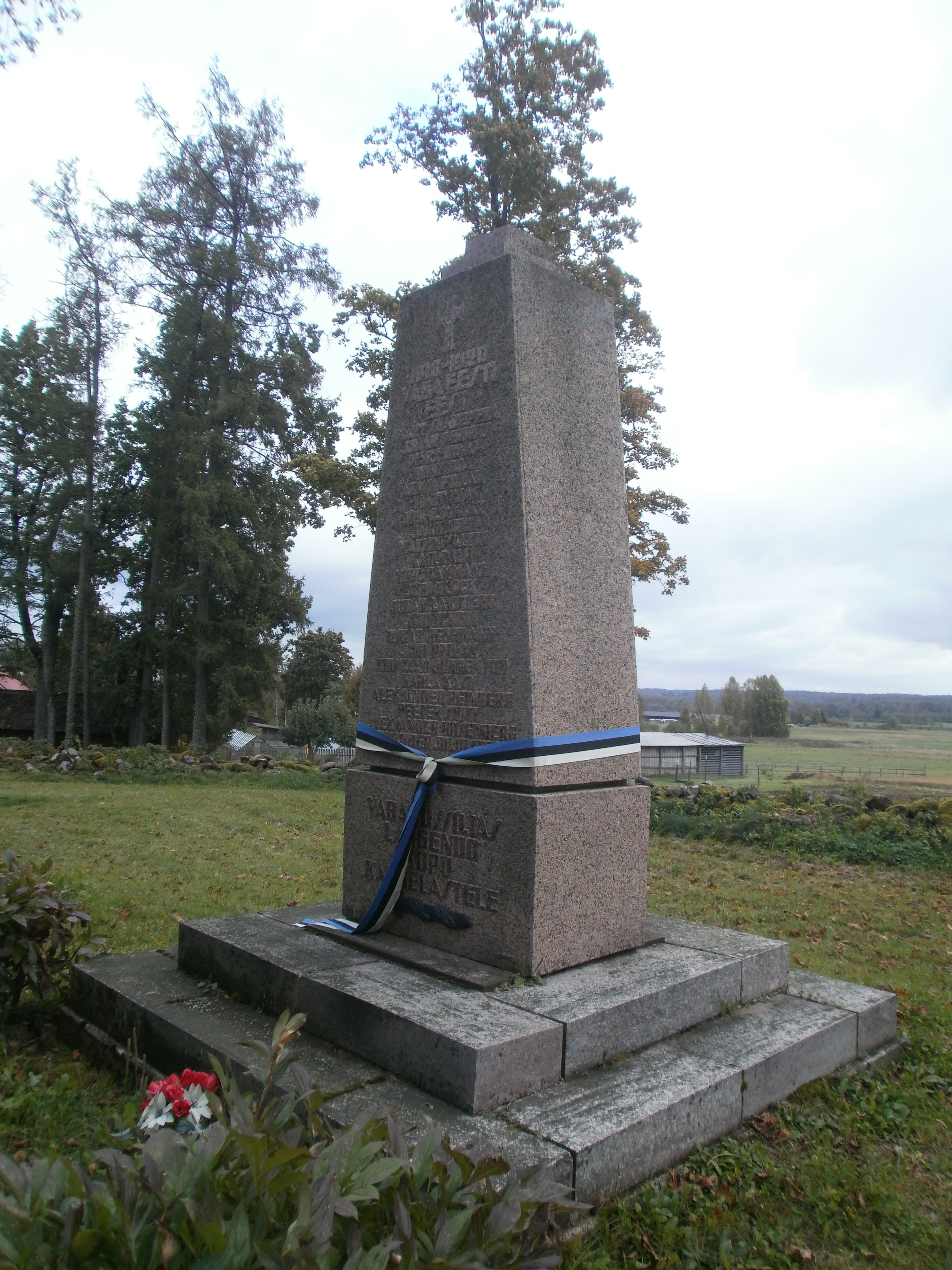 Vaade edelast.